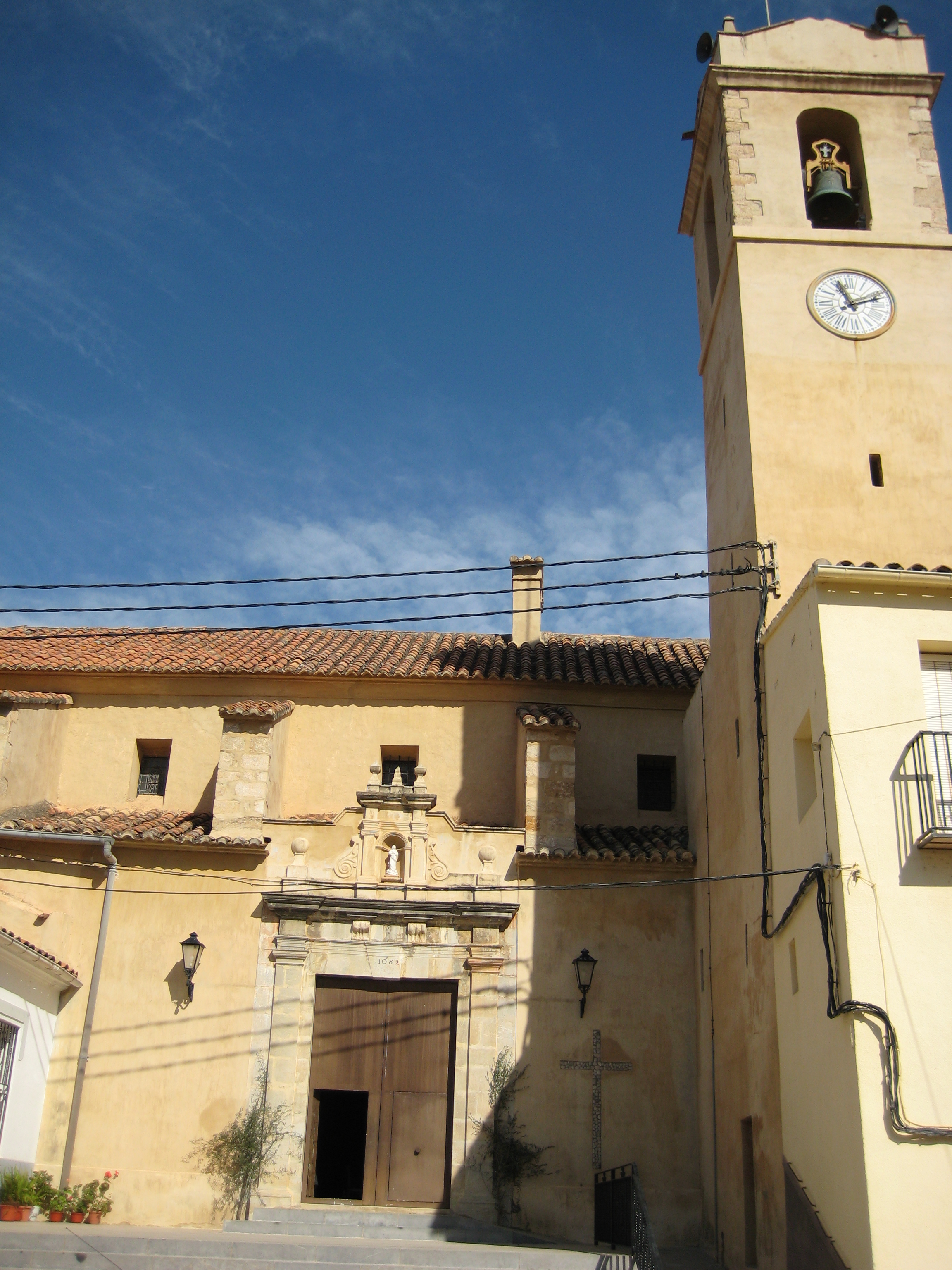 Façana de l'església de l'Assumpció de Fanzara (Alt Millars)